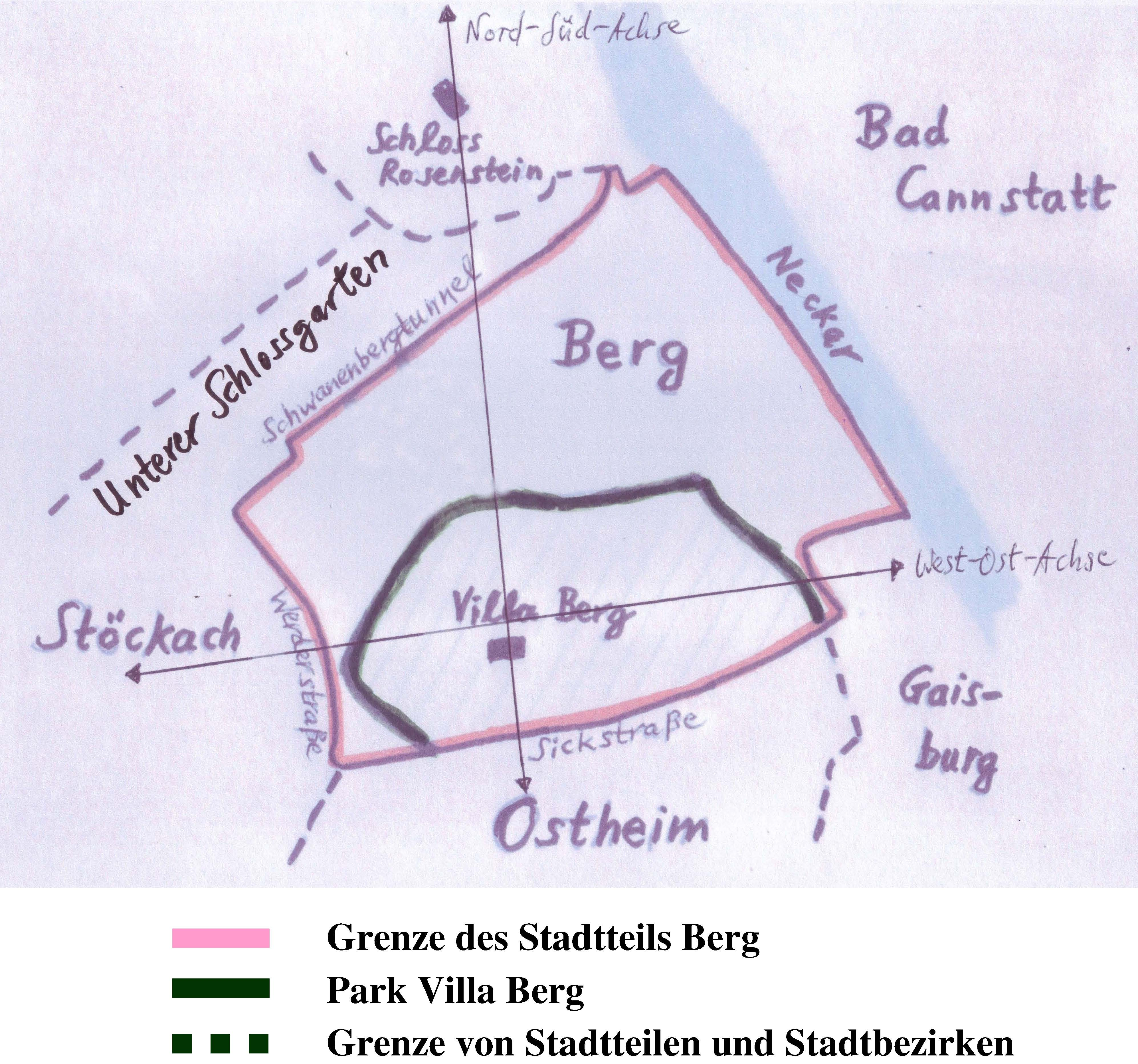 Stuttgart, Schemaplan von Berg und den angrenzenden Stadtteilen bzw. -bezirken.